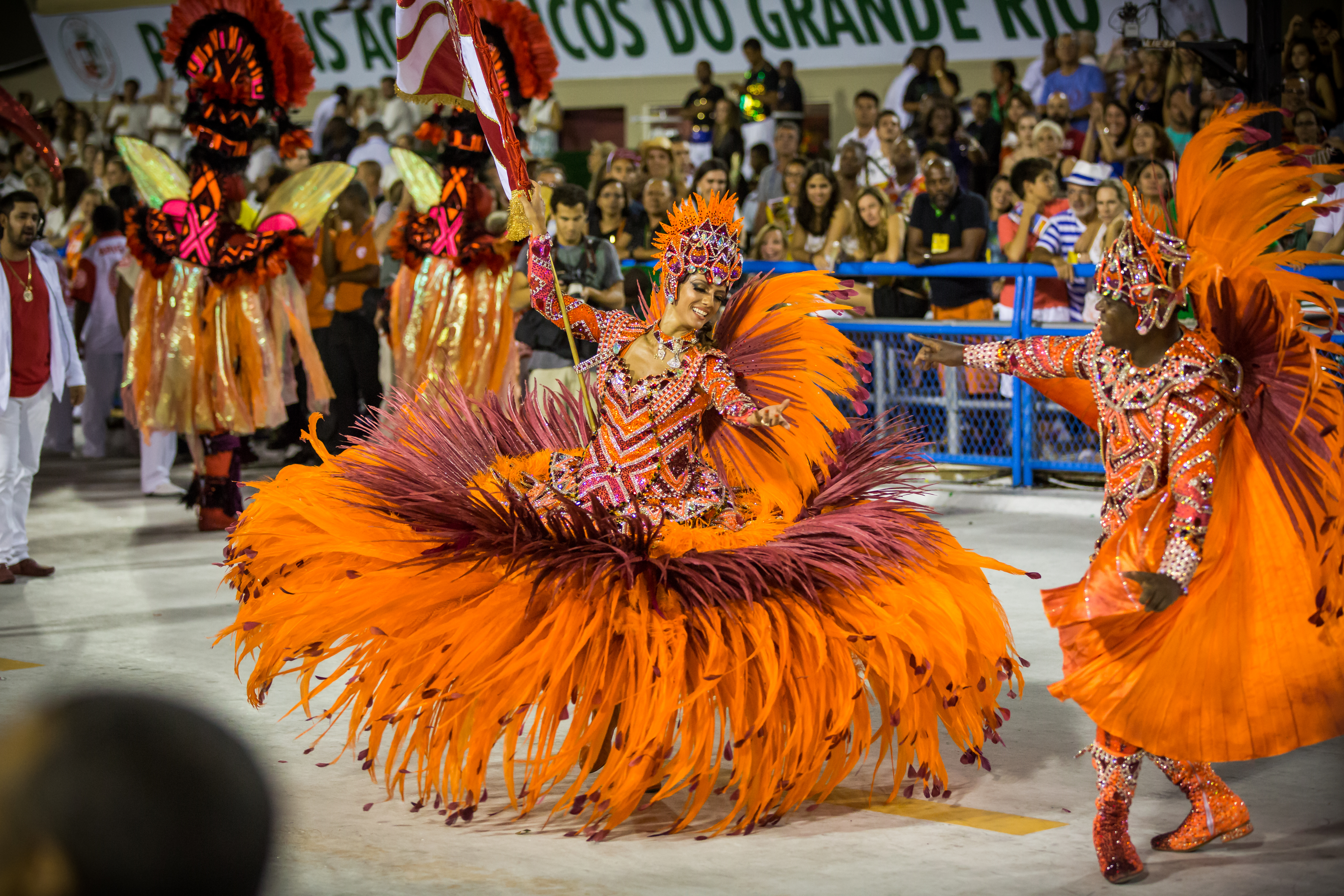 E70A3113.jpg